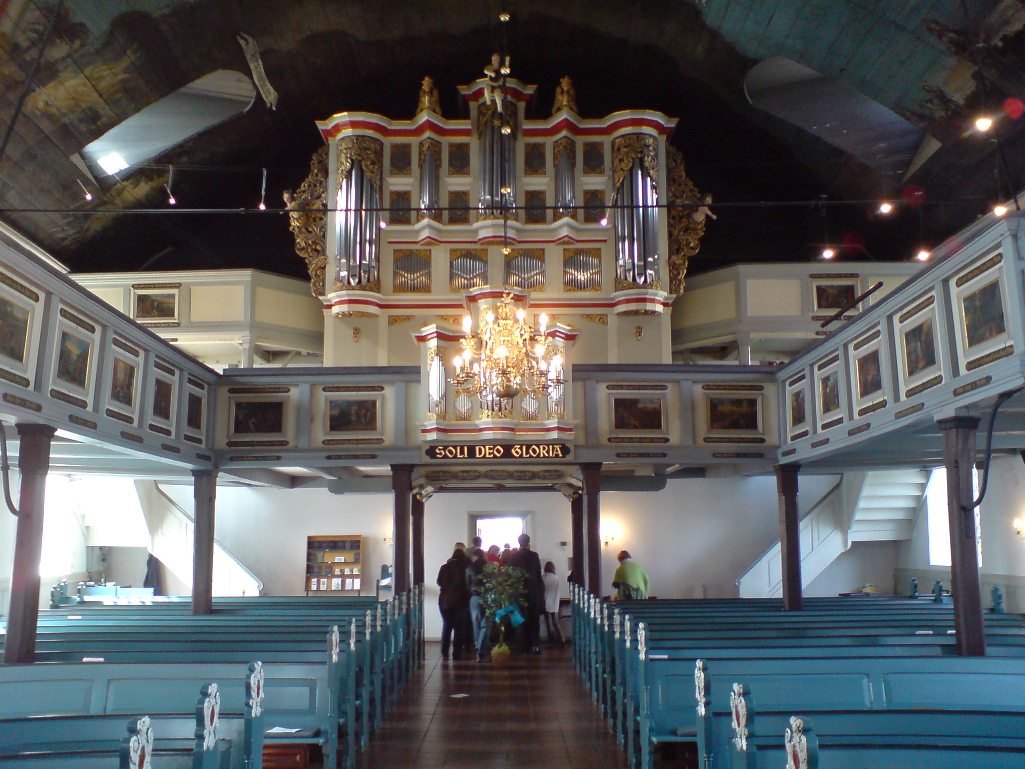 Barmstedt, HG-Kirche, Orgel